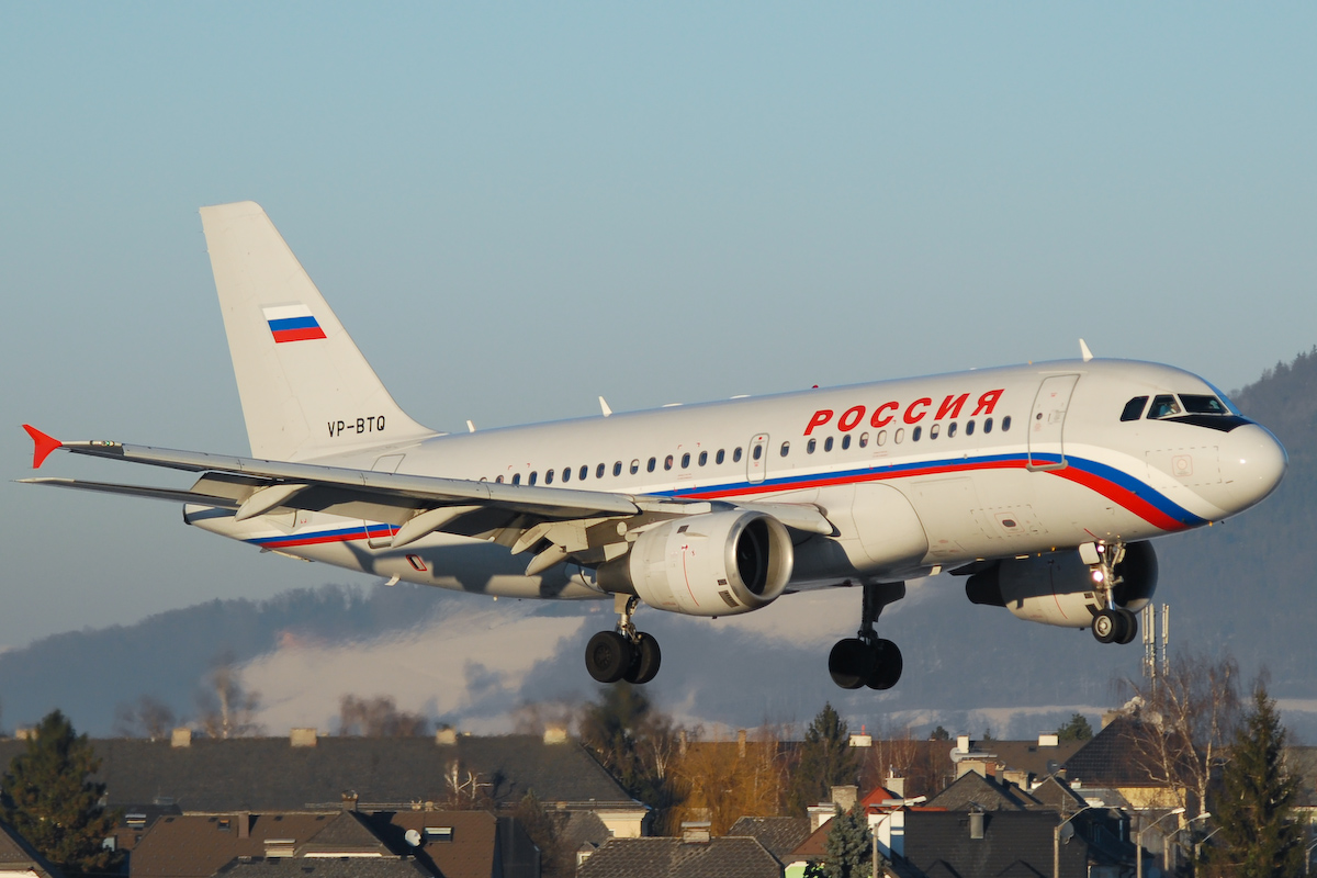 Rossija Airbus A319-114 landet in Salzburg